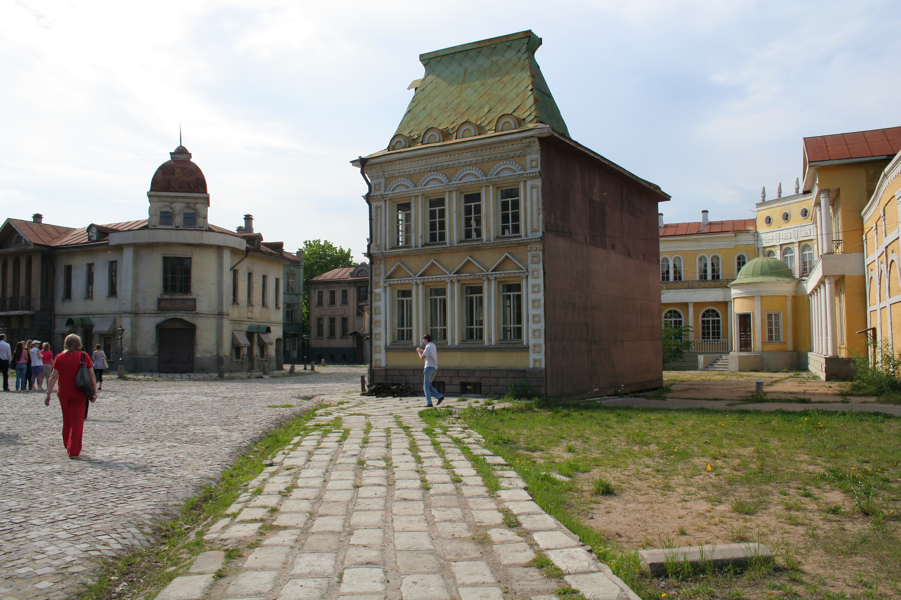 Filmstudiogelände von Mosfilm in Moskau. Dekoration „Altes Moskau“. Diverse Häuserattrappen.